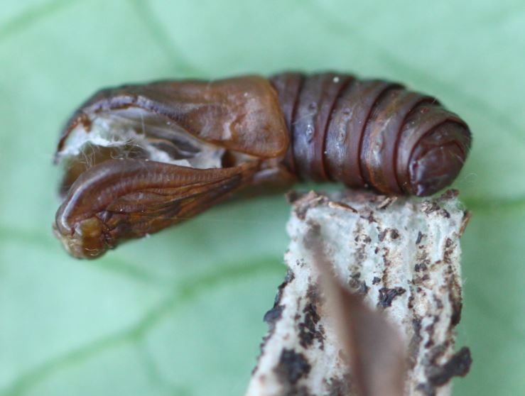 Geöffnete Puppe am hinteren Ende des Sacks des Großen Sackträgers (Canephora hirsuta) am 29. Mai 2018